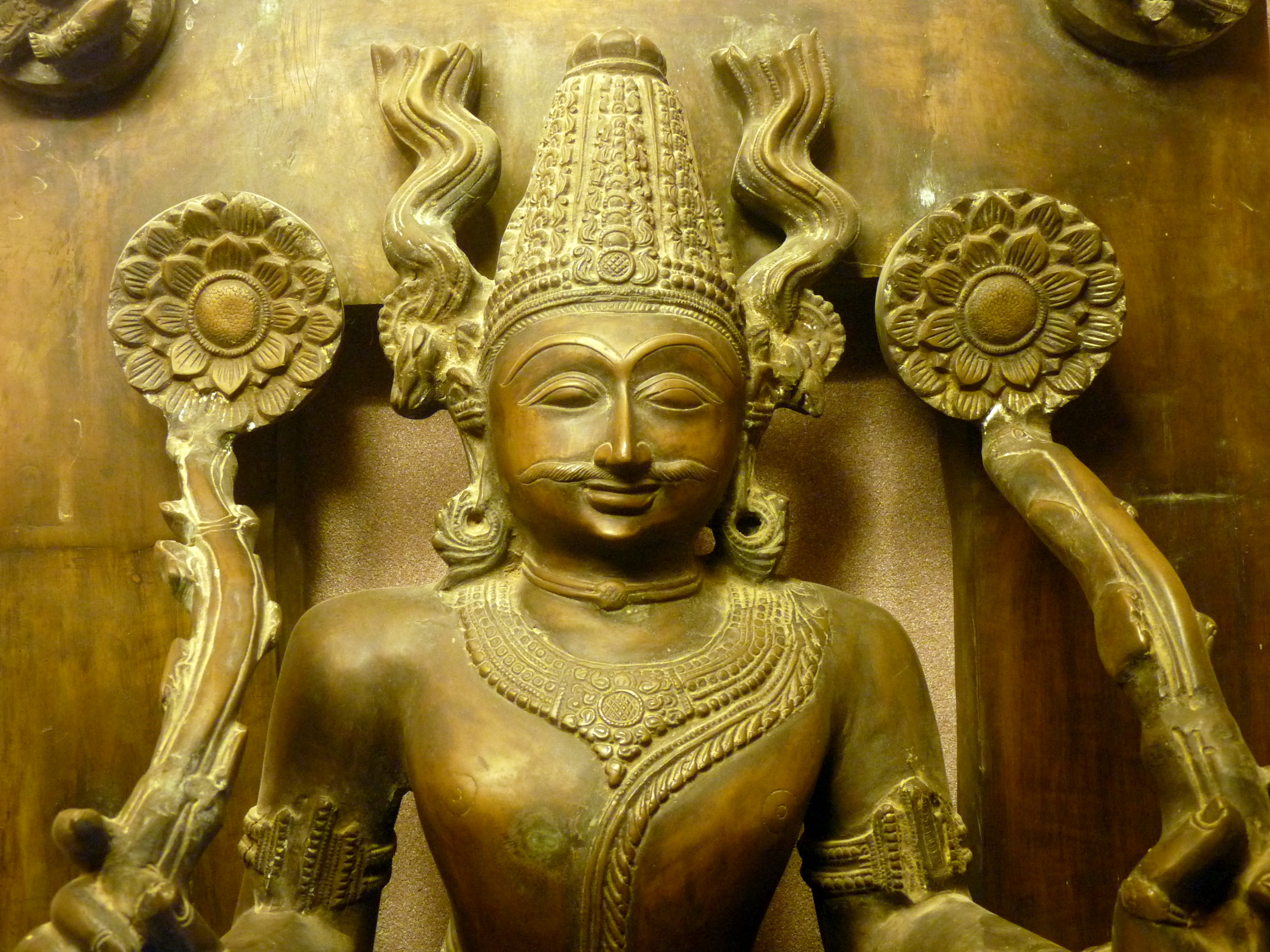 Brass deity, Orissa State Museum, Bhubaneswar